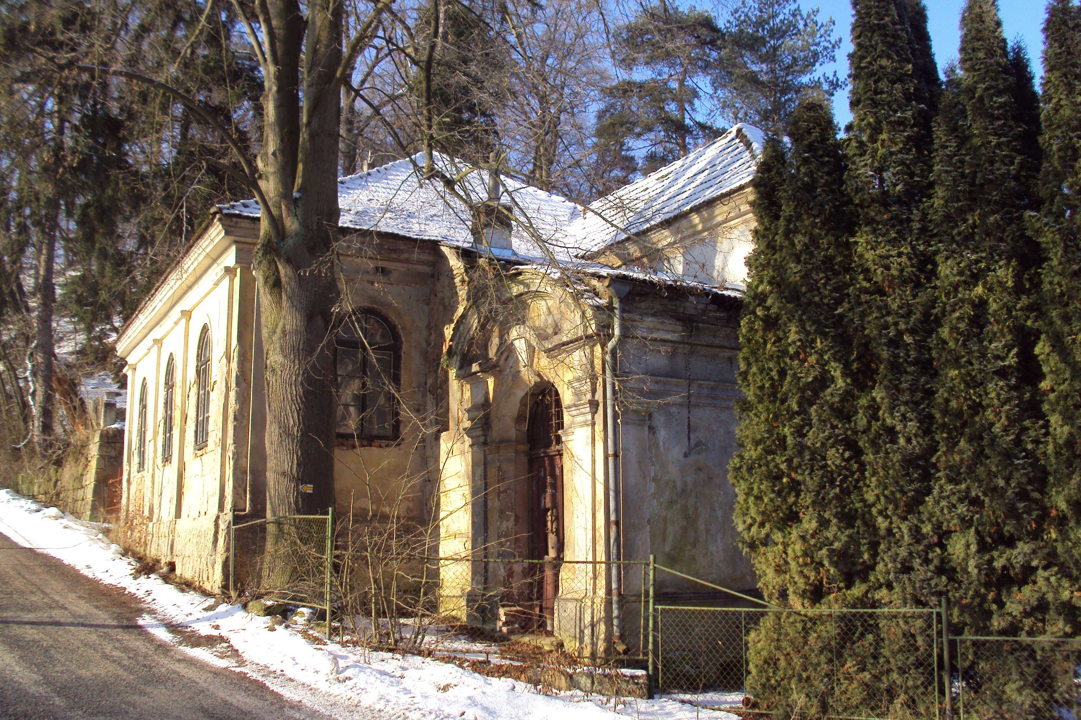 Víska poblíž Dubé